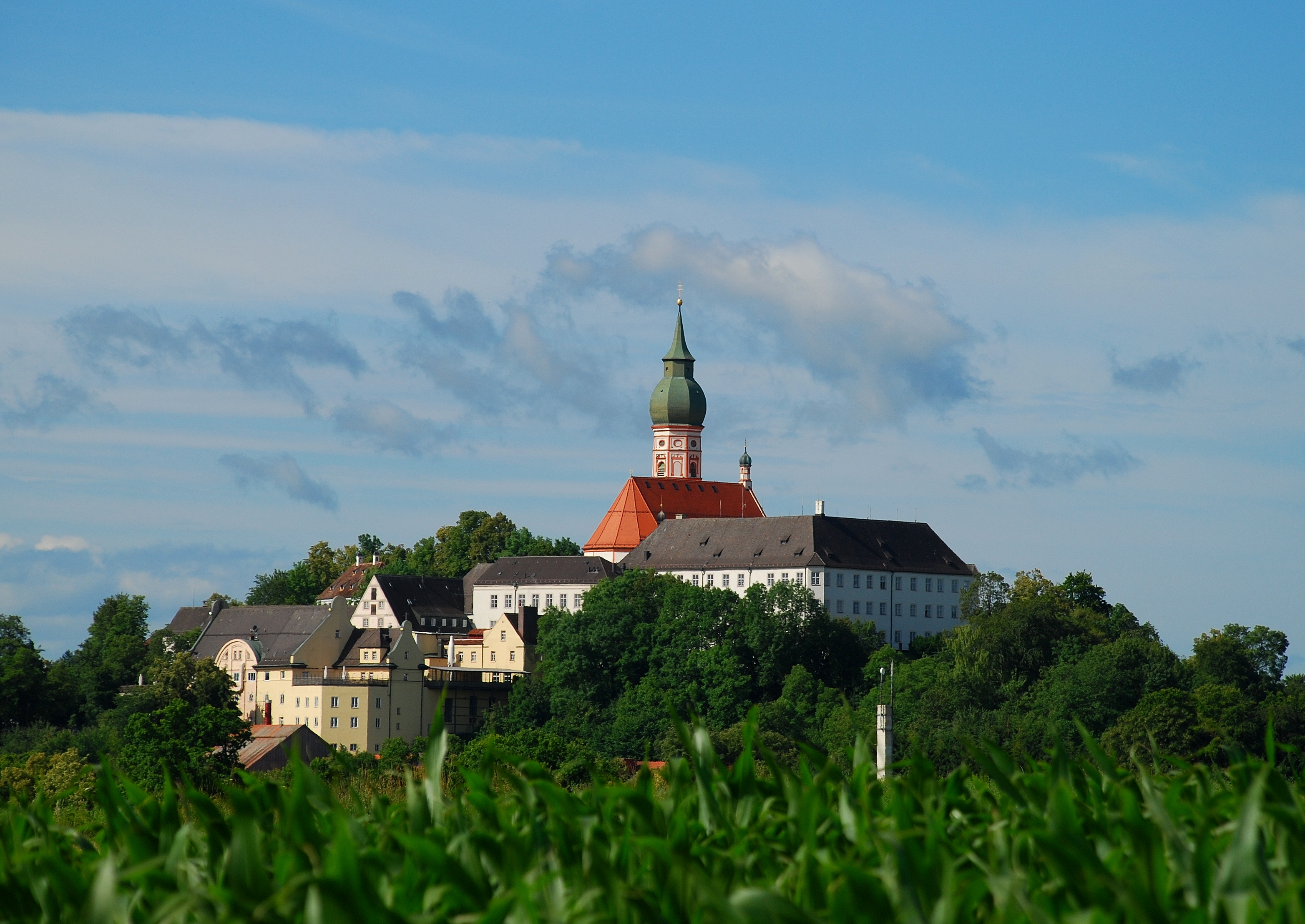 Kloster Andechs. Rechts von der Klosterkirche das Klostergebäude, in der Mitte links der Klostergasthof und unterhalb davon einige Wirtschaftsgebäude der Klosteranlage.